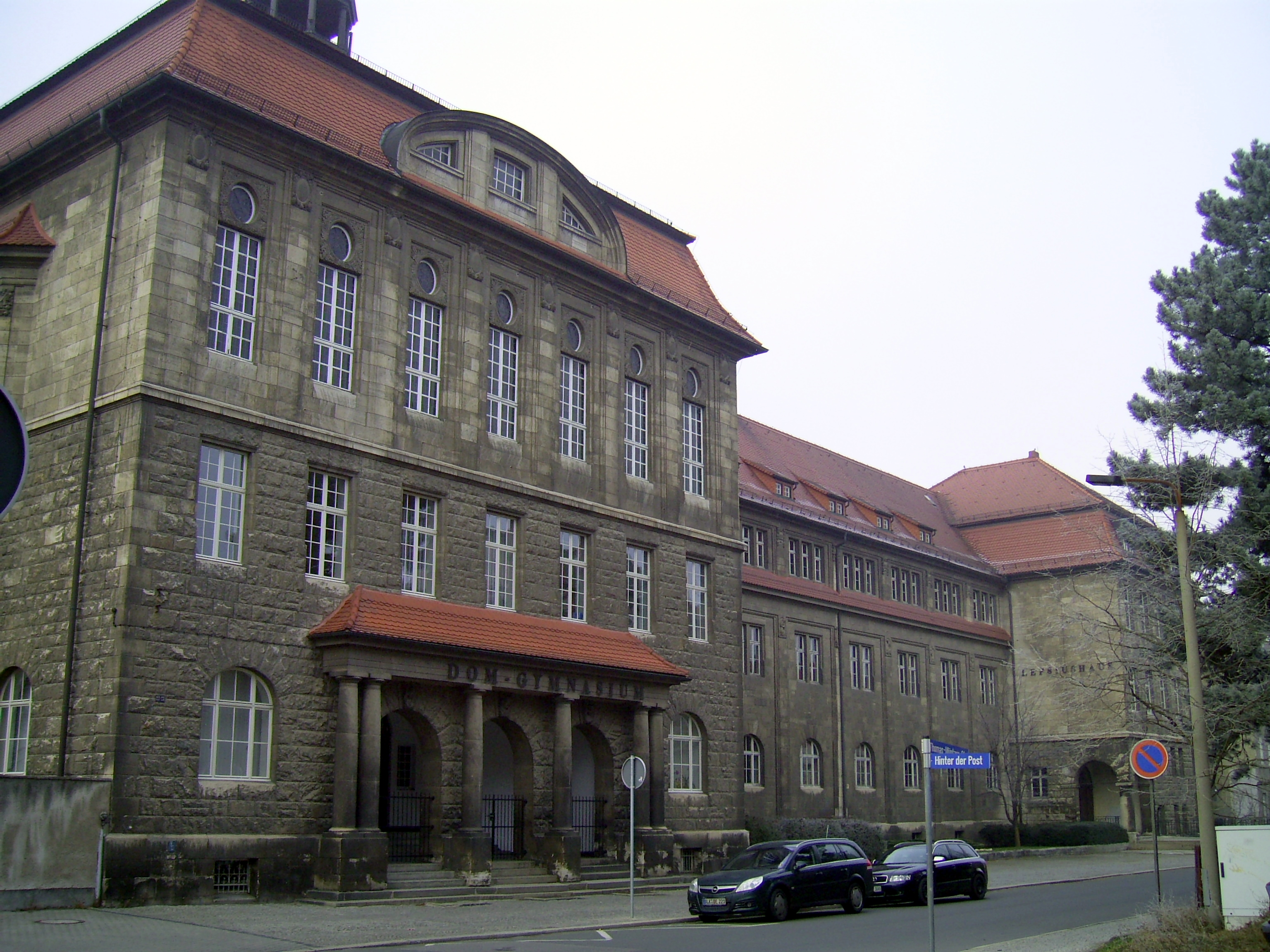 Hauptgebäude des Domgymnasiums in Naumburg (Saale), Thomas-Müntzer-Straße (ehemaliges Lepsiusgymnasium)